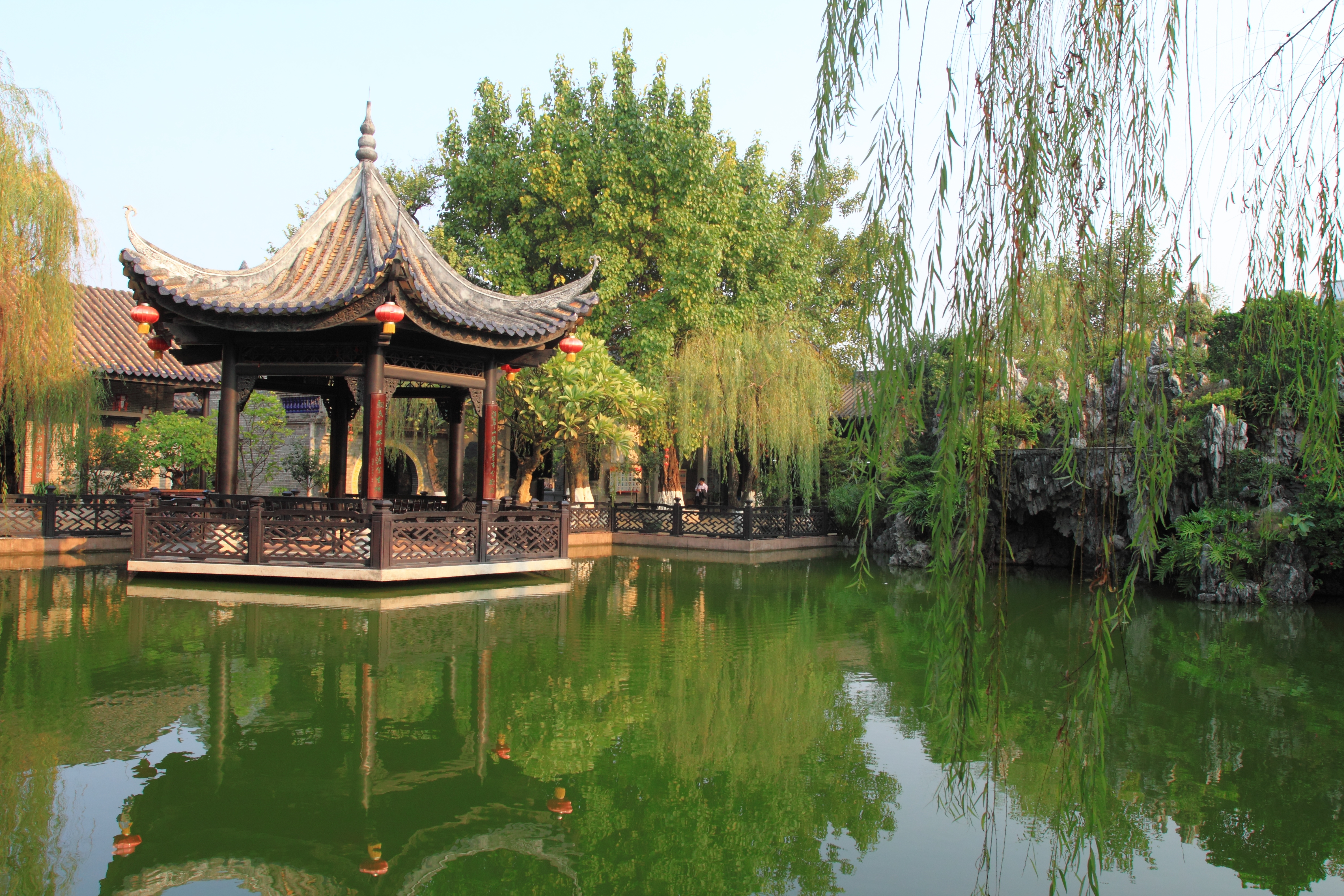 广州市番禺区南村镇余荫山房